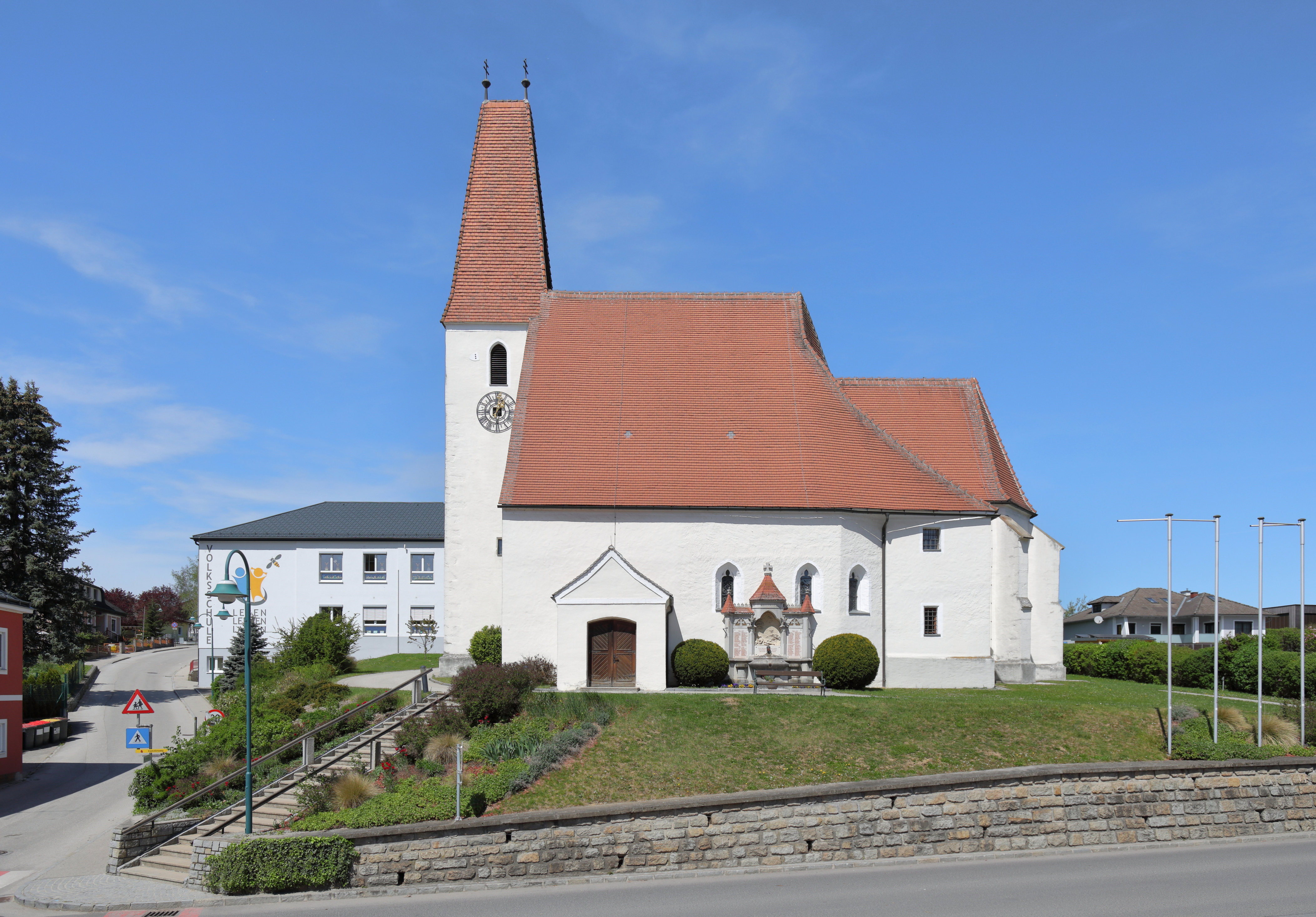 Ortszentrum der niederösterreichischen Marktgemeinde Zeillern mit der röm.-kath. Pfarrkirche hl. Jakobus der Ältere und links im Hintergrund die Volksschule.Die Pfarrkirche, eine spätgotische Staffelkirche mit einem steilen Satteldach und eingezogenem Chor, wurde mehrmals umgebaut und von 1889 bis 1899 regotisiert. Der vorgestellte Westturm stammt aus dem 14. Jahrhundert und das steile Keildach wurde im 19. Jahrhundert aufgesetzt.